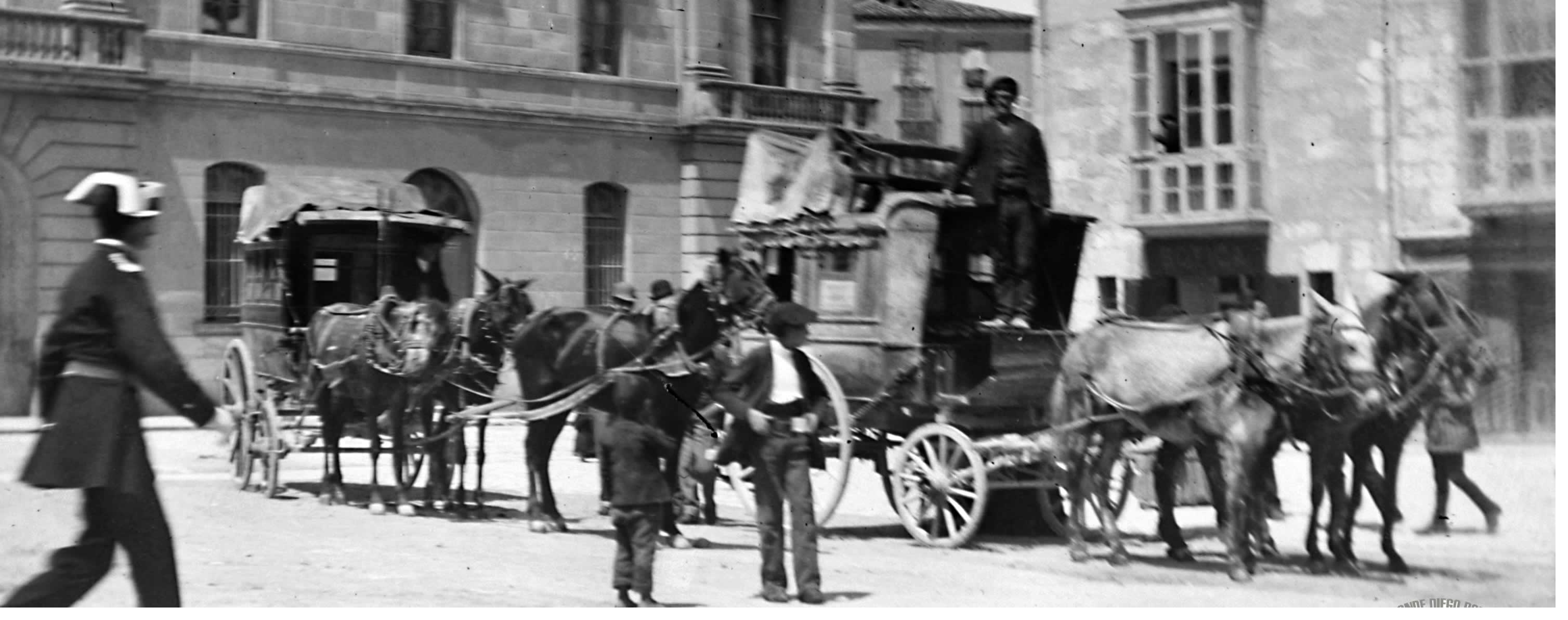 Calesa atravesando la plaza de Prim, hoy de Santo Domingo de Guzmán; a la izquierda el palacio provincial, entonces Gobierno Civil. Finales del siglo XIX.